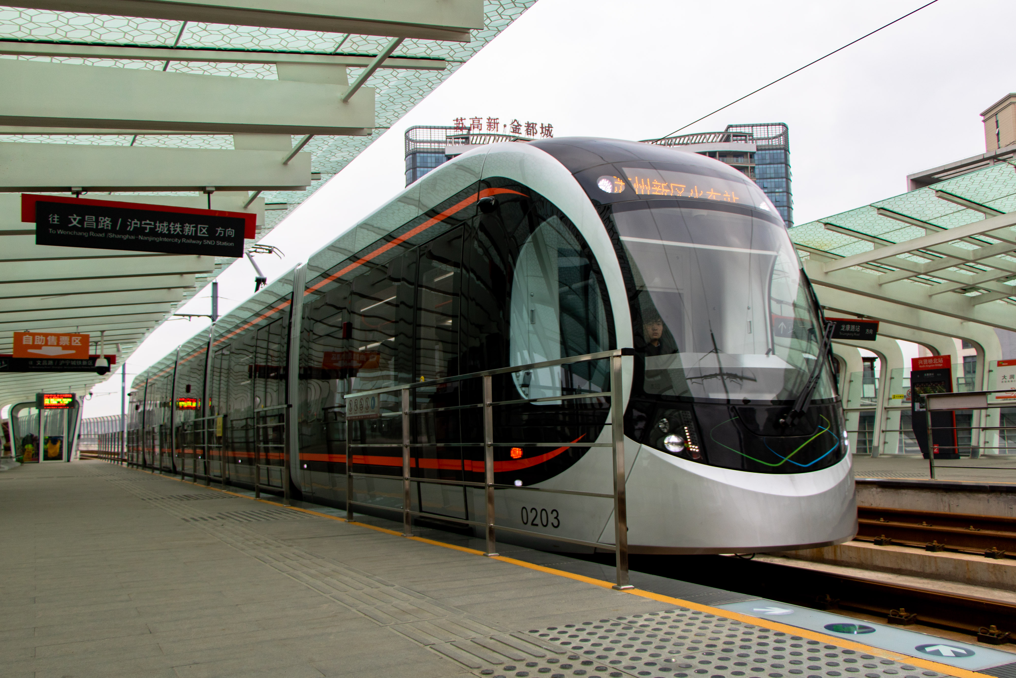 中文（中国大陆）: 苏州高新区有轨电车2号线